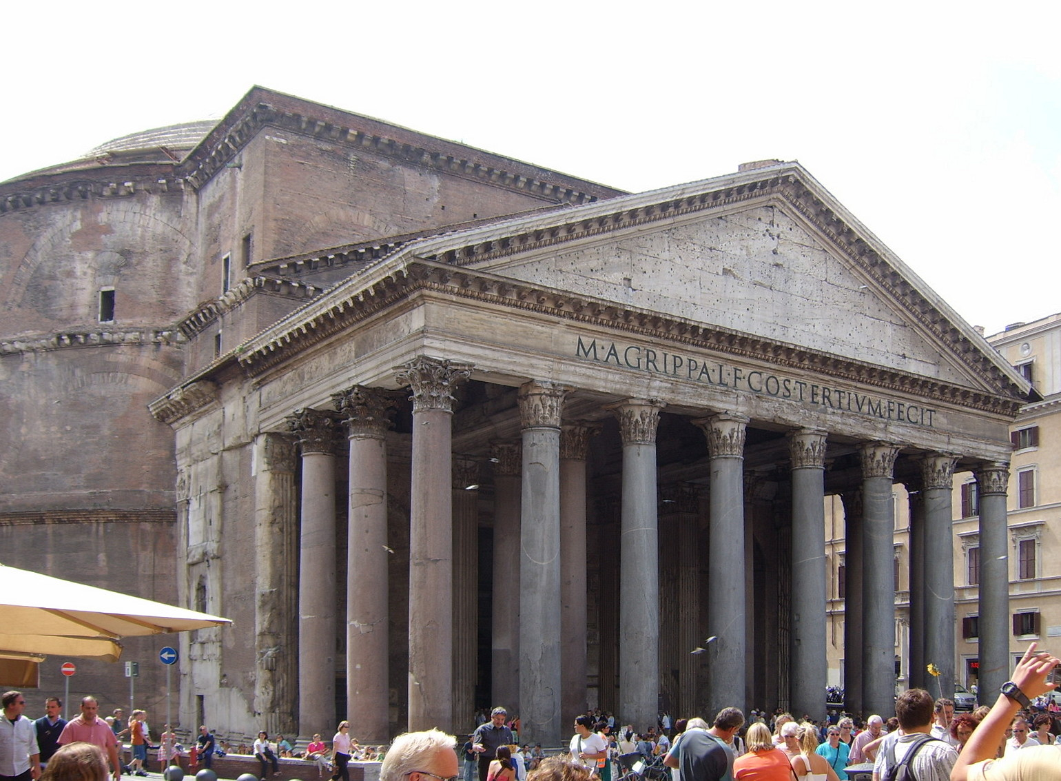 Das Pantheon in Rom. 12.09.2005 Quelle/Lizenz: selbst fotografiert --Nize 22:34, 23. Okt 2005 (CEST) Nicolai Schäfer